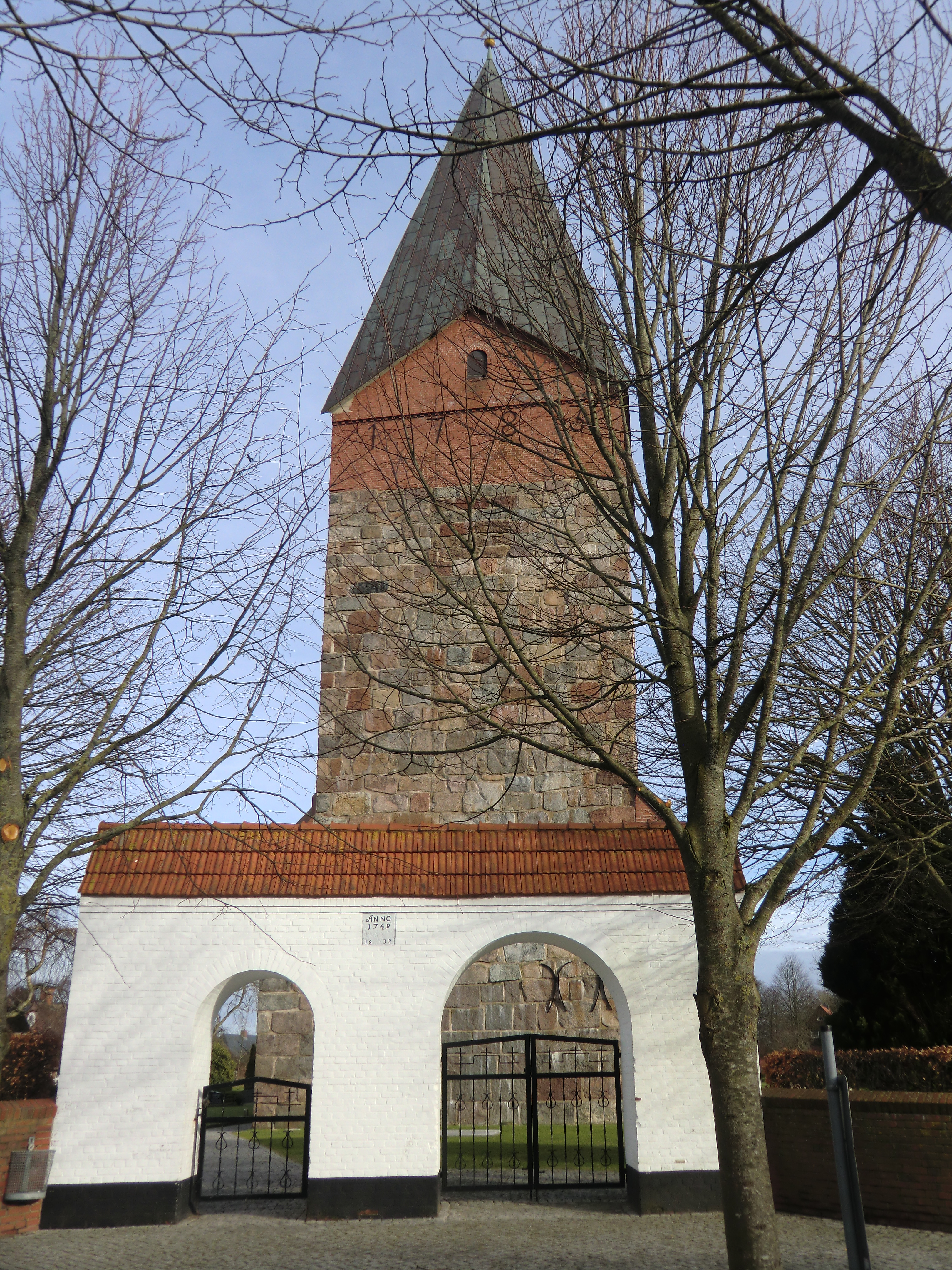 Eingang